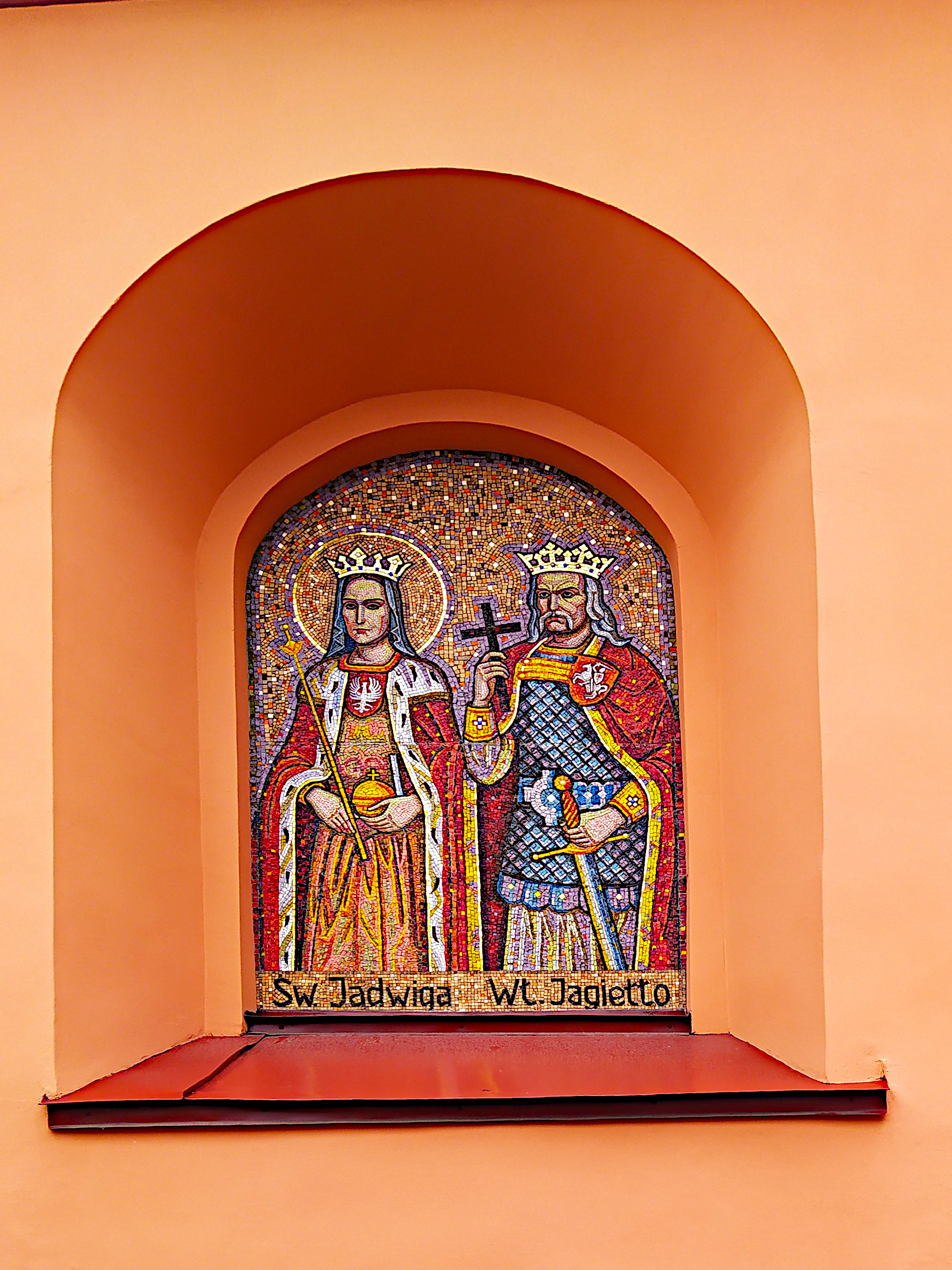 Городок. Костел Воздвиження. Мозаїка на північній бічній стіні.